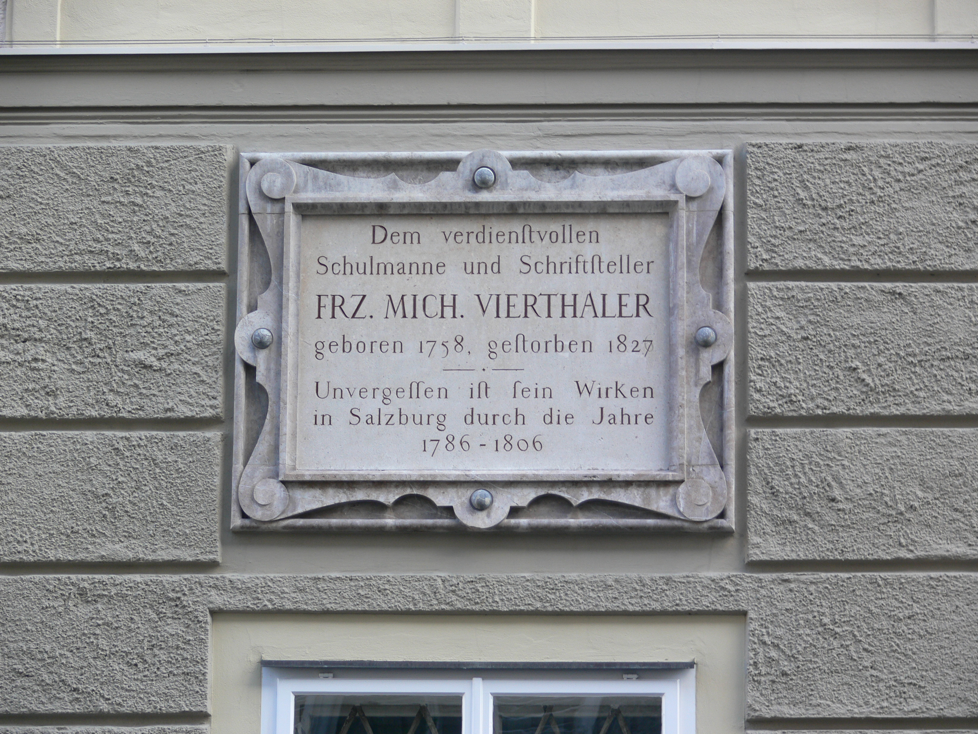 Alte Universität, Universitätsplatz, Tafel für Franz Michael Vierthaler